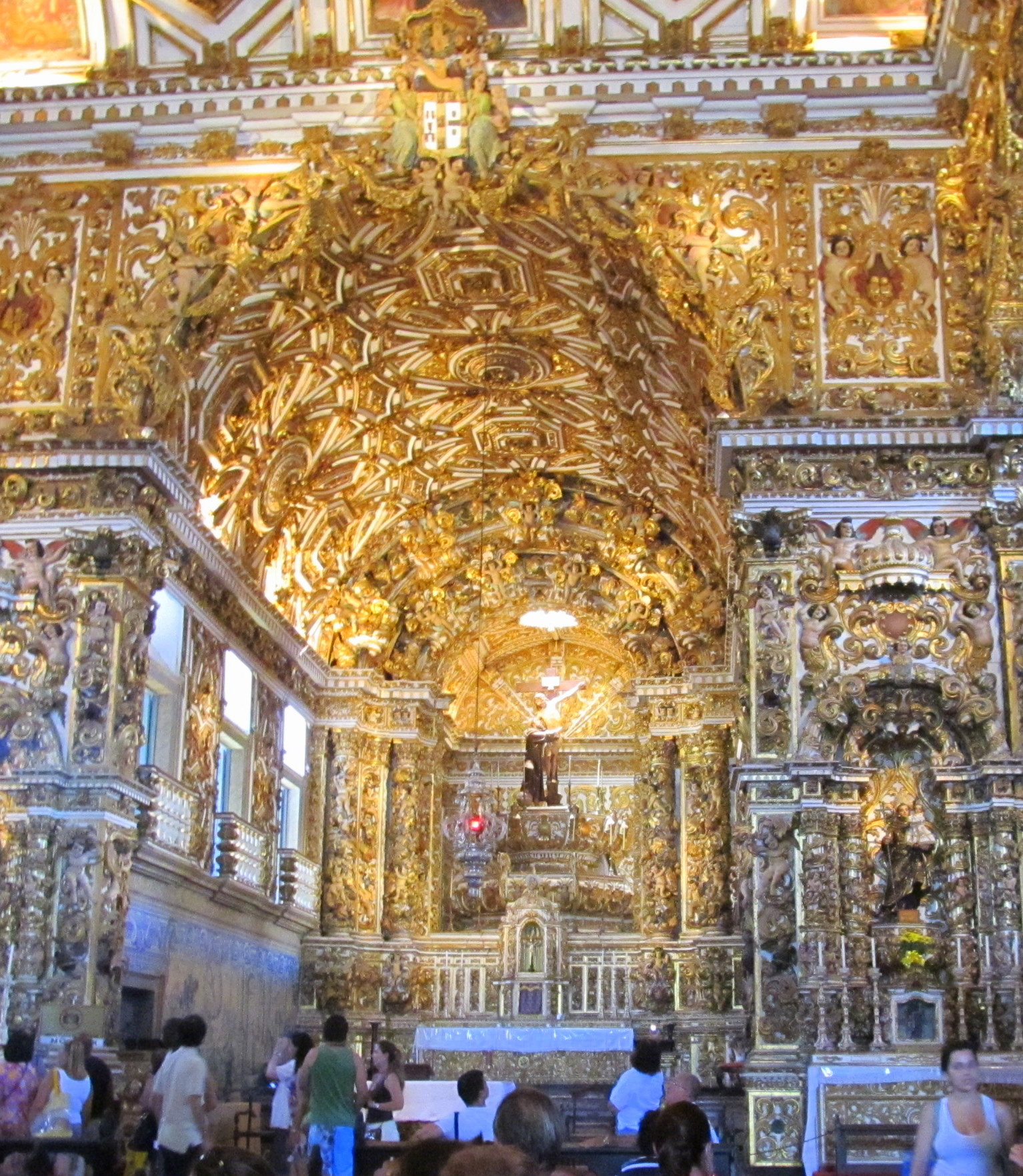 Igreja São Francisco de Assis - No interior da Igreja, em sua construção, foram usados 800 quilos de ouro.